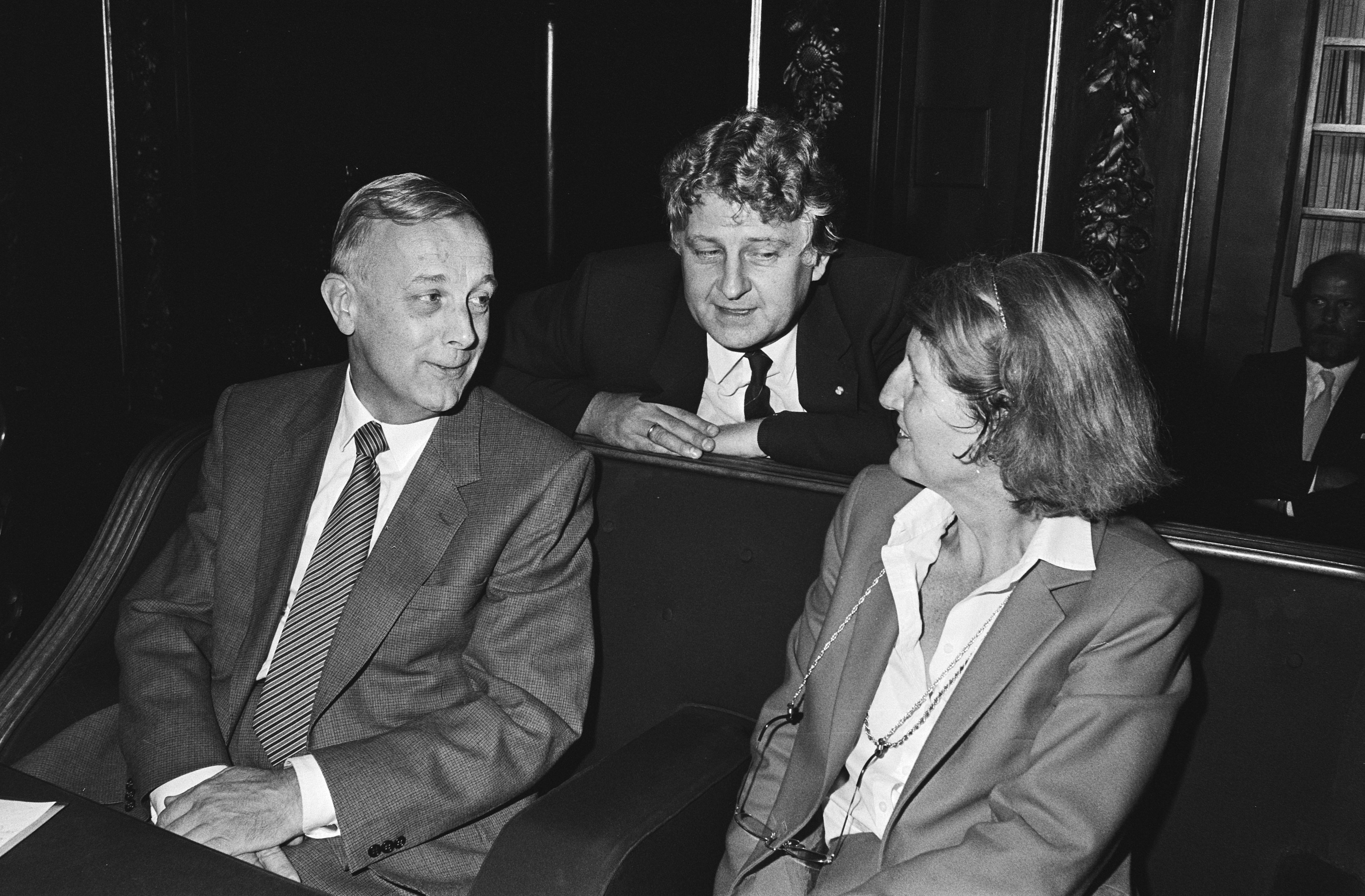 V.l.n.r. Dhr. Piet Steenkamp, (nieuwe voorzitter CDA), dhr. Bukman en Mw. Leyten (=Judith Juliëtte Madeleine Sophie (Madeleen) Leyten-de Wijkerslooth de Weerdesteyn) tijdens het tellen van de stemmen (Den Haag, 13 sept. 1983)